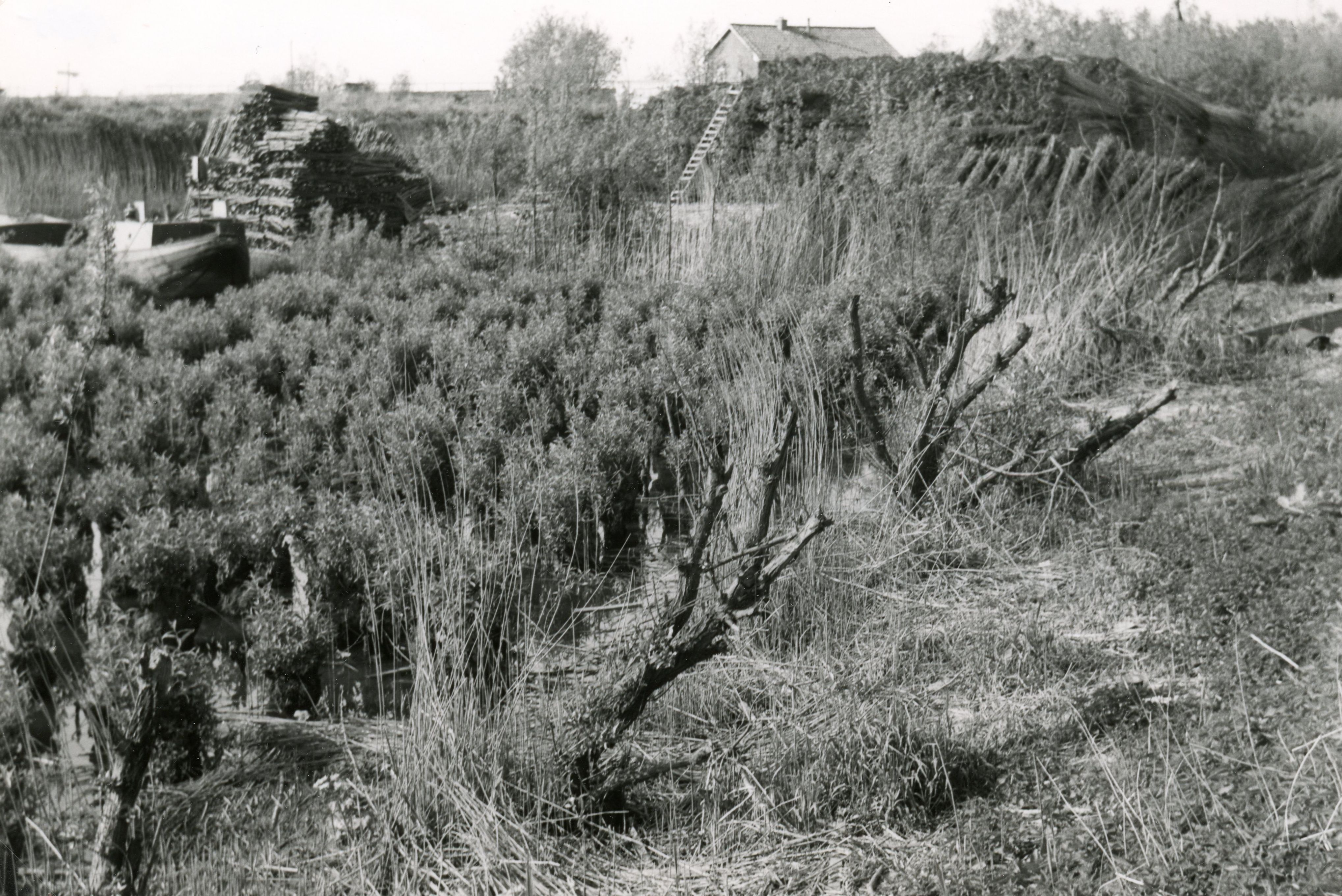 Stapels griendhout bij Allemanshaven ±1966